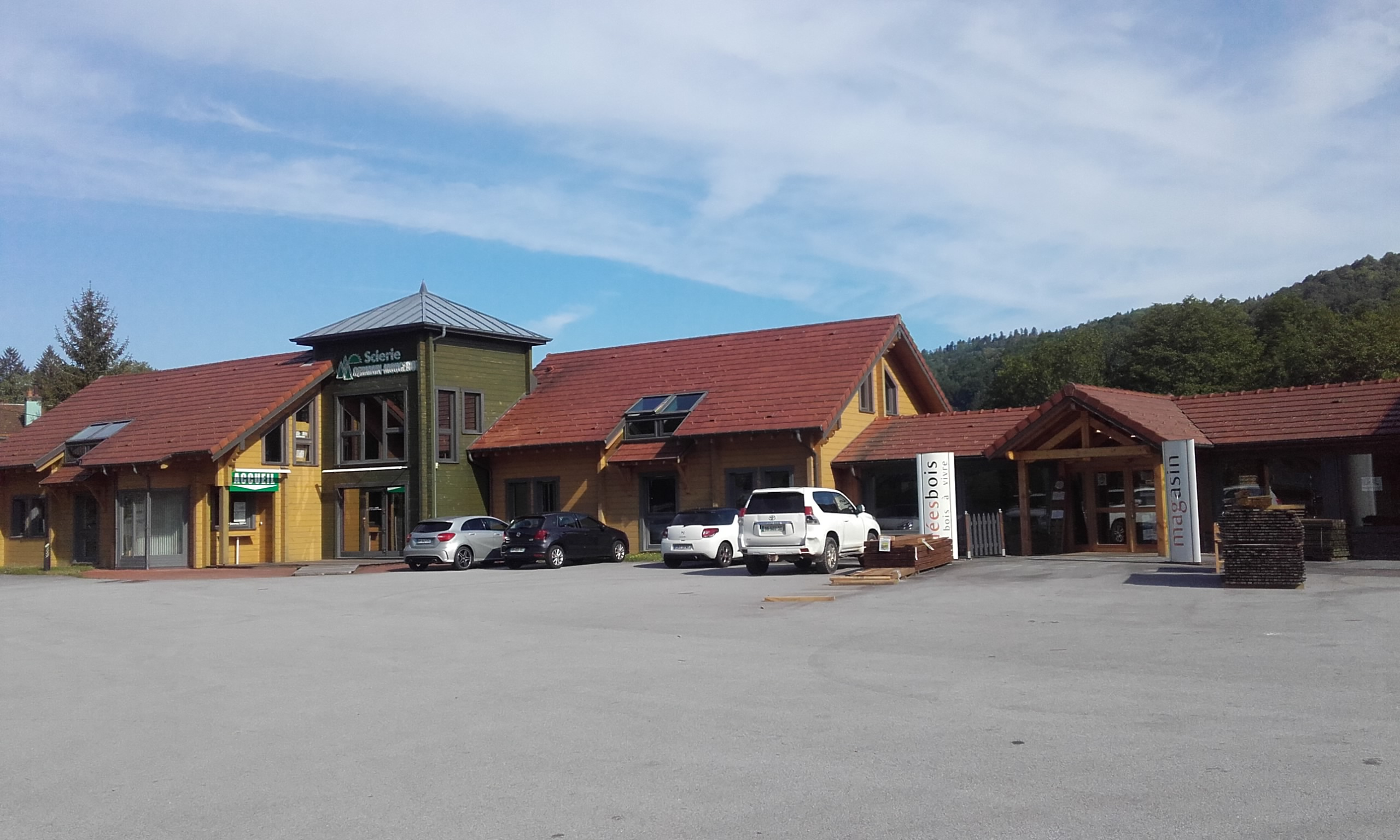 Vosges, Scierie Germain-Mougenot de Saulxures-sur-Moselotte. Le Président de la République Emmanuel Macron s'est rendu sur le site de la scierie le 18 avril 2018. L'entreprise a investi 15 millions d'€uros dans un outil performant, un Carter fabriqué en Allemagne. La scierie, désormais la plus importante de la Loraine, est aussi parmi les 10 plus grosses scieries de France.